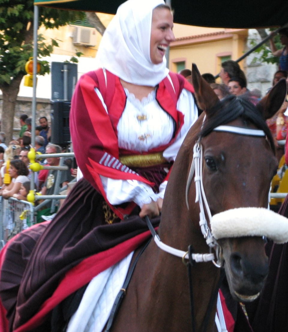 ragazza nuorese a cavallo